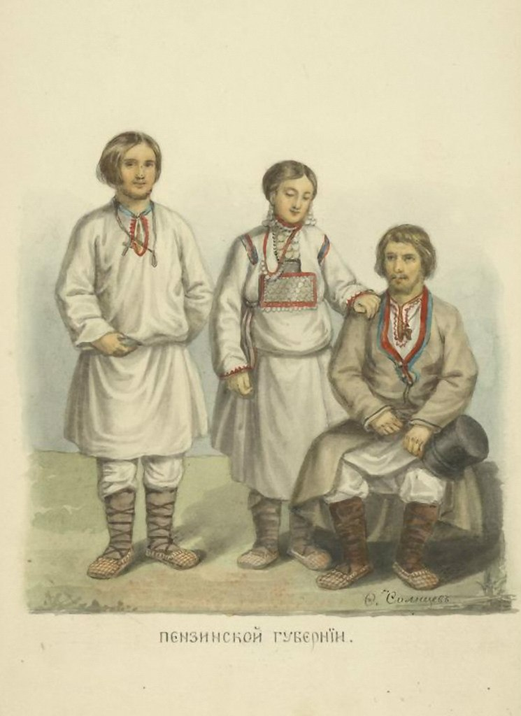 Солнцев Ф. Г. Пензенская губерния. «Одежды Русского государства».